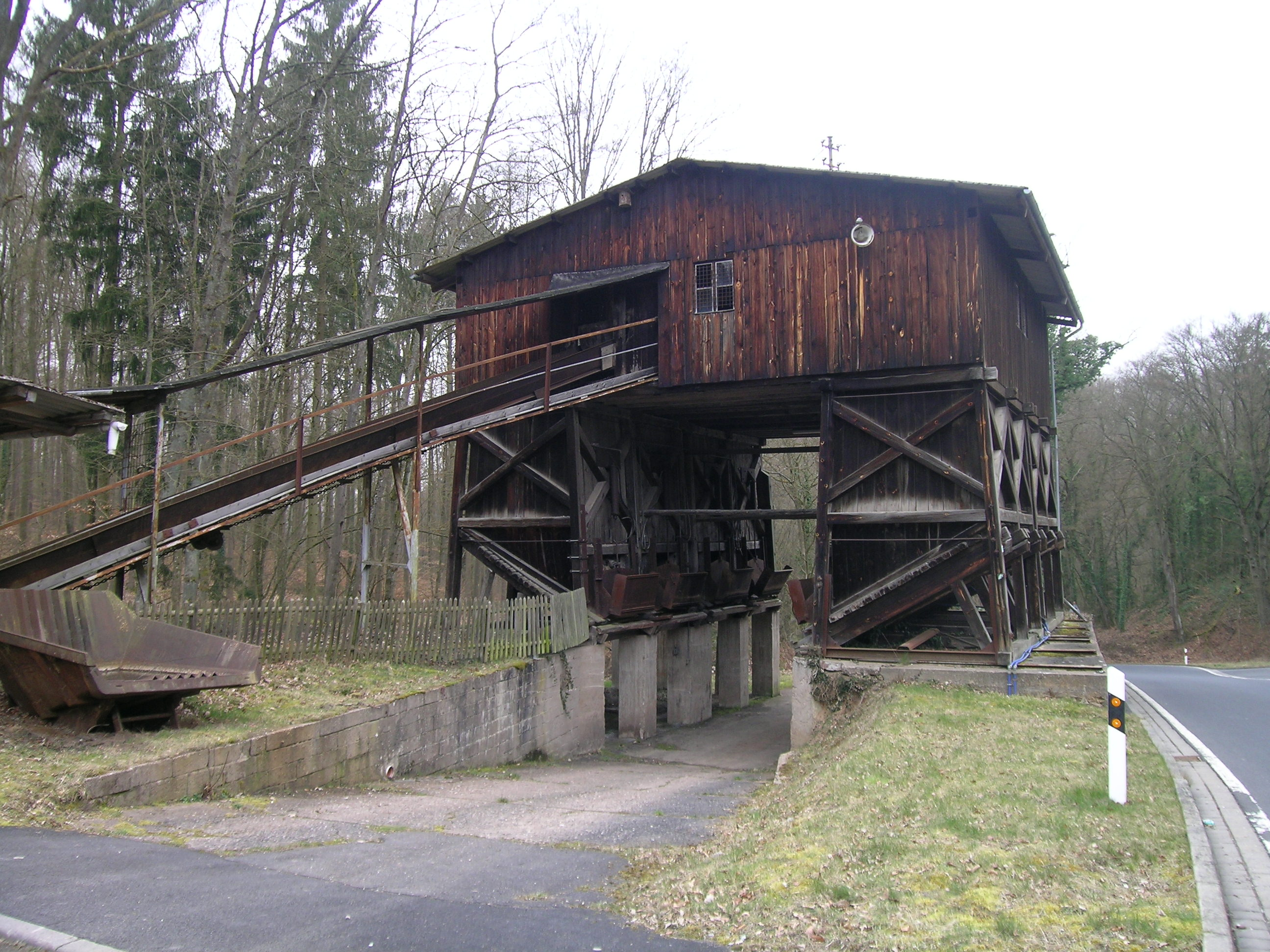 Tonbergwerk Klingenberg (Sortieranlage)